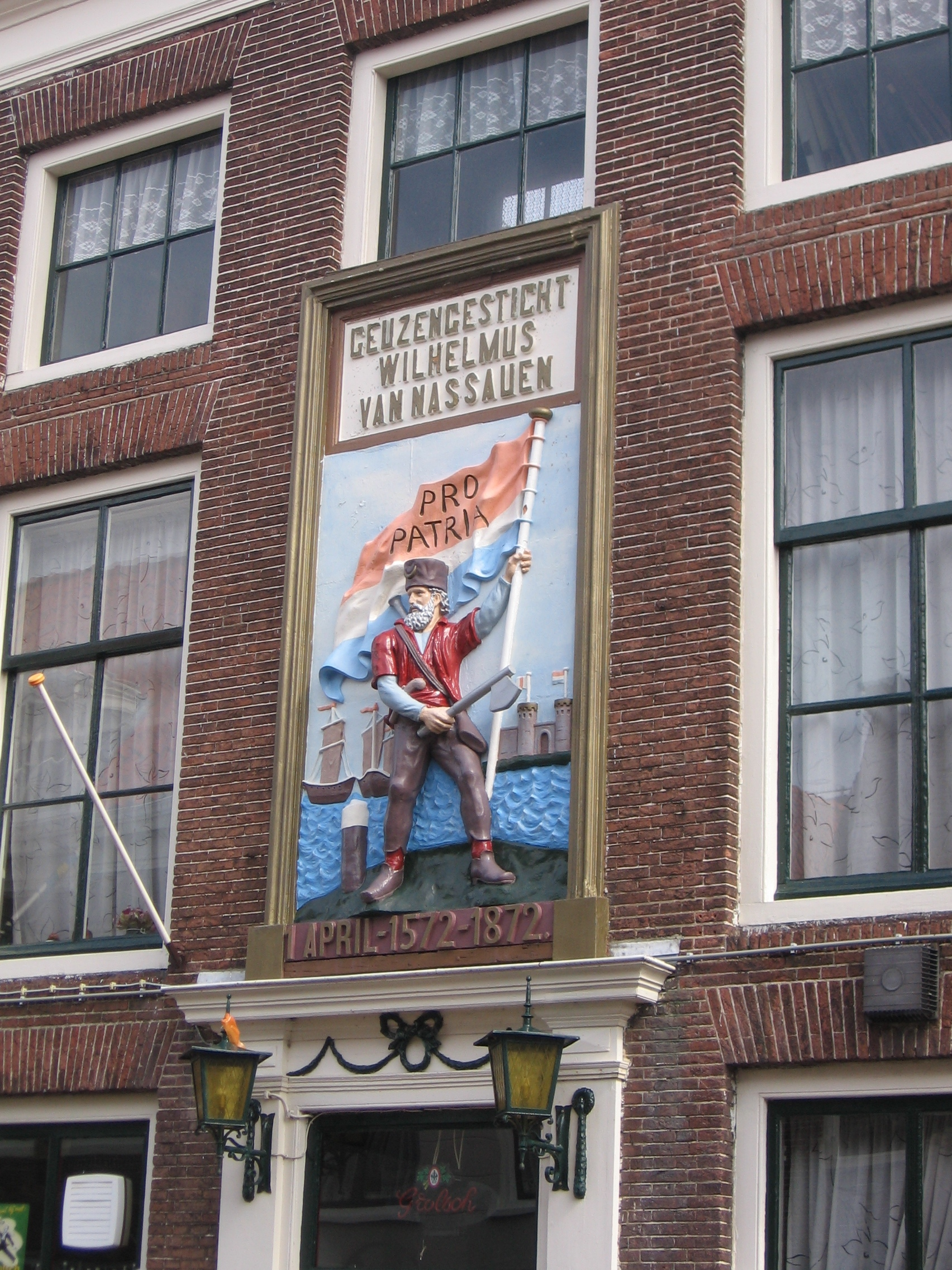 Brielle